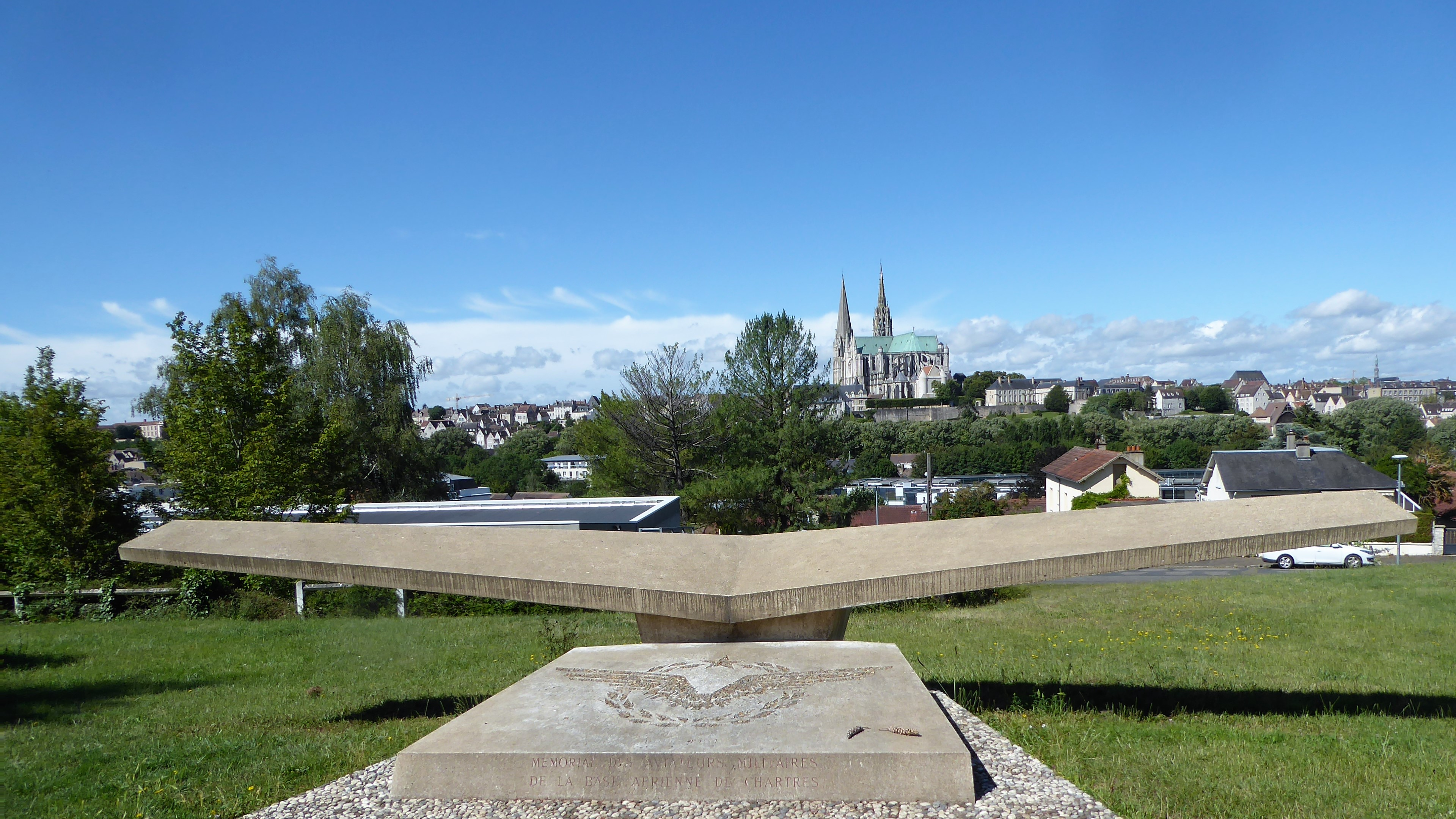 "Mémorial des aviateurs militaires de la base aérienne de Chartres", Eure-et-Loir, France.